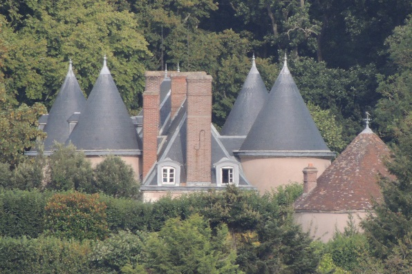 château de Bouglainval, toitures des tours, du bâtiment central et du colombier, entourées des arbres du parc, Eure-et-Loir, France.